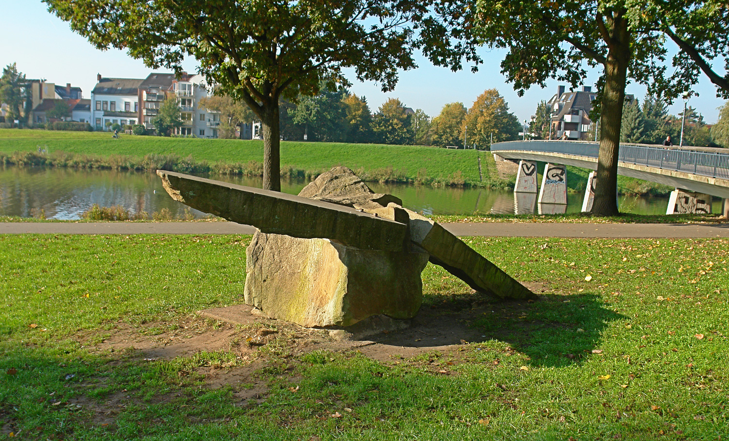 Ikarus I. Aufstellungsort: Buntentorsteinweg. Das Kunstwerk entstand im Rahmen eines internationalen Bildhauer Symposions vom 11.08.1986 bis 10.09.1986 in den Bremer Wallanlagen hinter der Kunsthalle. Seit 1987 befindet es sich an der Kleinen Weser, Höhe Kleine Weserbrücke, Deichschartweg in Bremen - Neustadt. Material: Ibbenbürener Sandstein, 1,5 m x 4 m. Entwurf und Ausführung: Bernd Uiberall k: kunst im öffentlichen raum bremen